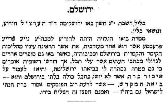 ידיעה על עליית הרצל להר הבית בעת ביקורו בירושלים